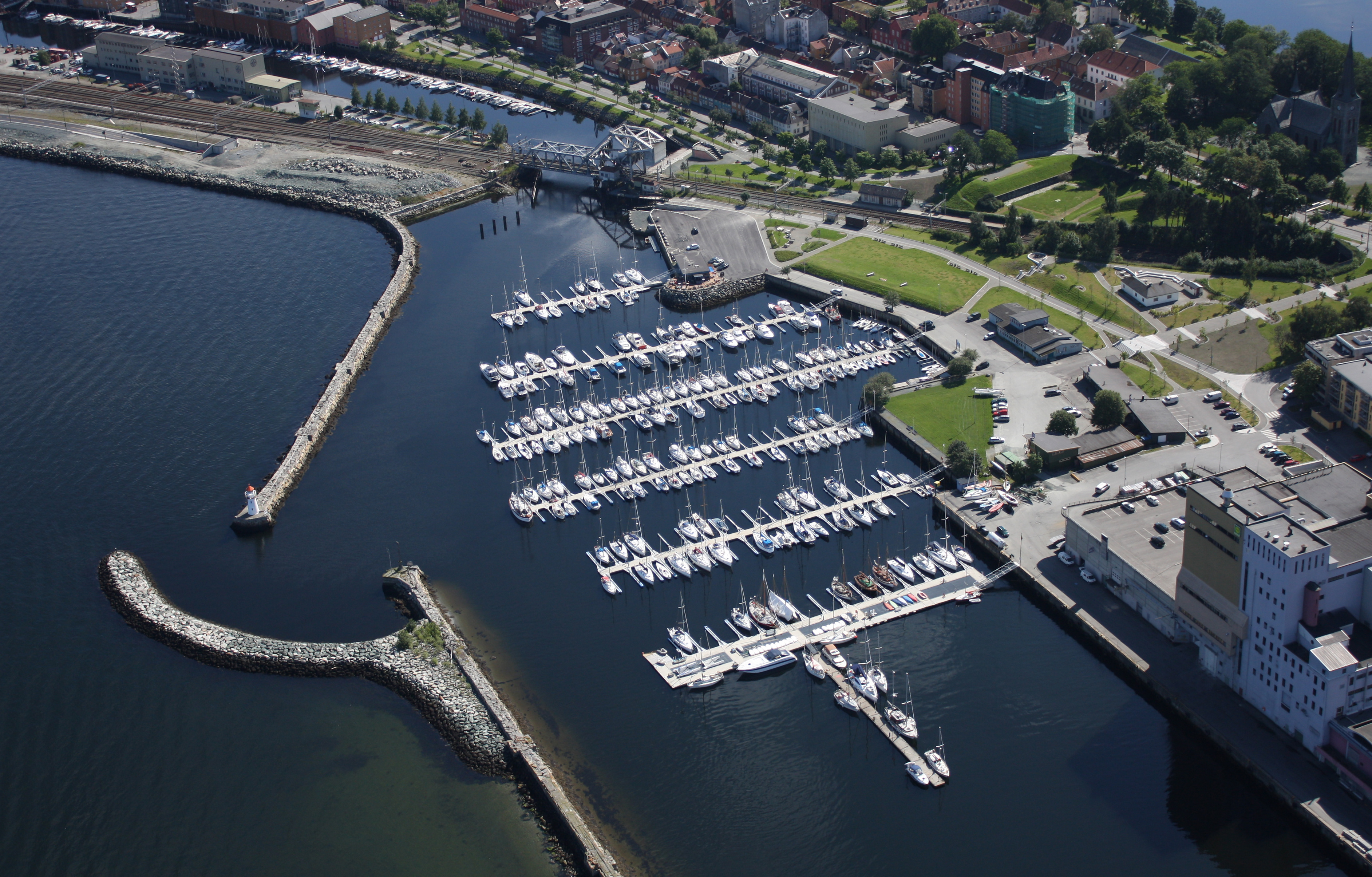 Skansen småbåthavn